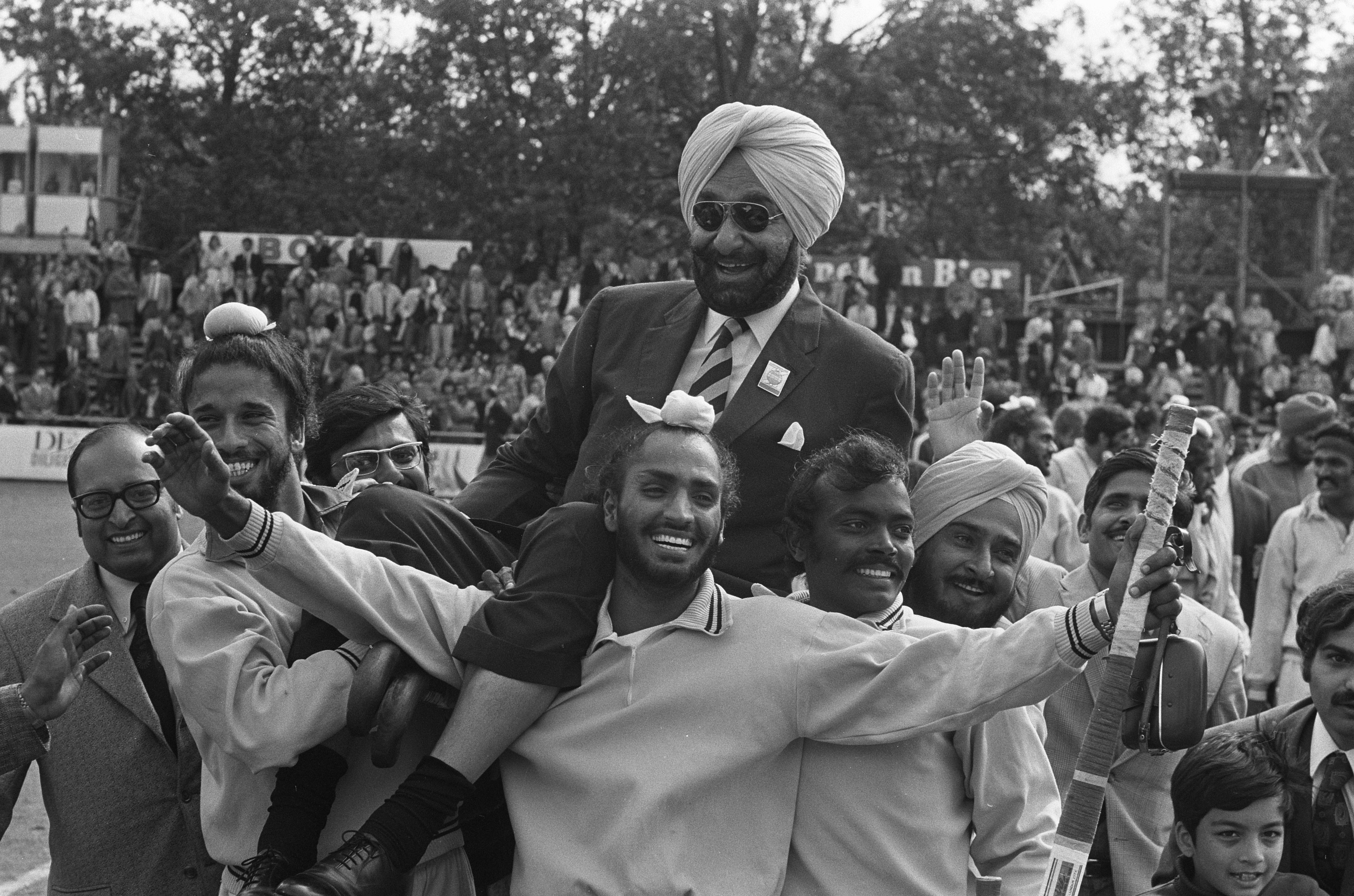 Collectie / Archief : Fotocollectie Anefo Reportage / Serie : [ onbekend ] Beschrijving : Wereldbeker Hockey halve finale, India tegen Pakistan 1-0 Ambassadeur van India op de schouders Datum : 31 augustus 1973 Trefwoorden : ambassadeurs, hockey Fotograaf : Verhoeff, Bert / Anefo Auteursrechthebbende : Nationaal Archief Materiaalsoort : Negatief (zwart/wit) Nummer archiefinventaris : bekijk toegang 2.24.01.05 Bestanddeelnummer : 926-6502